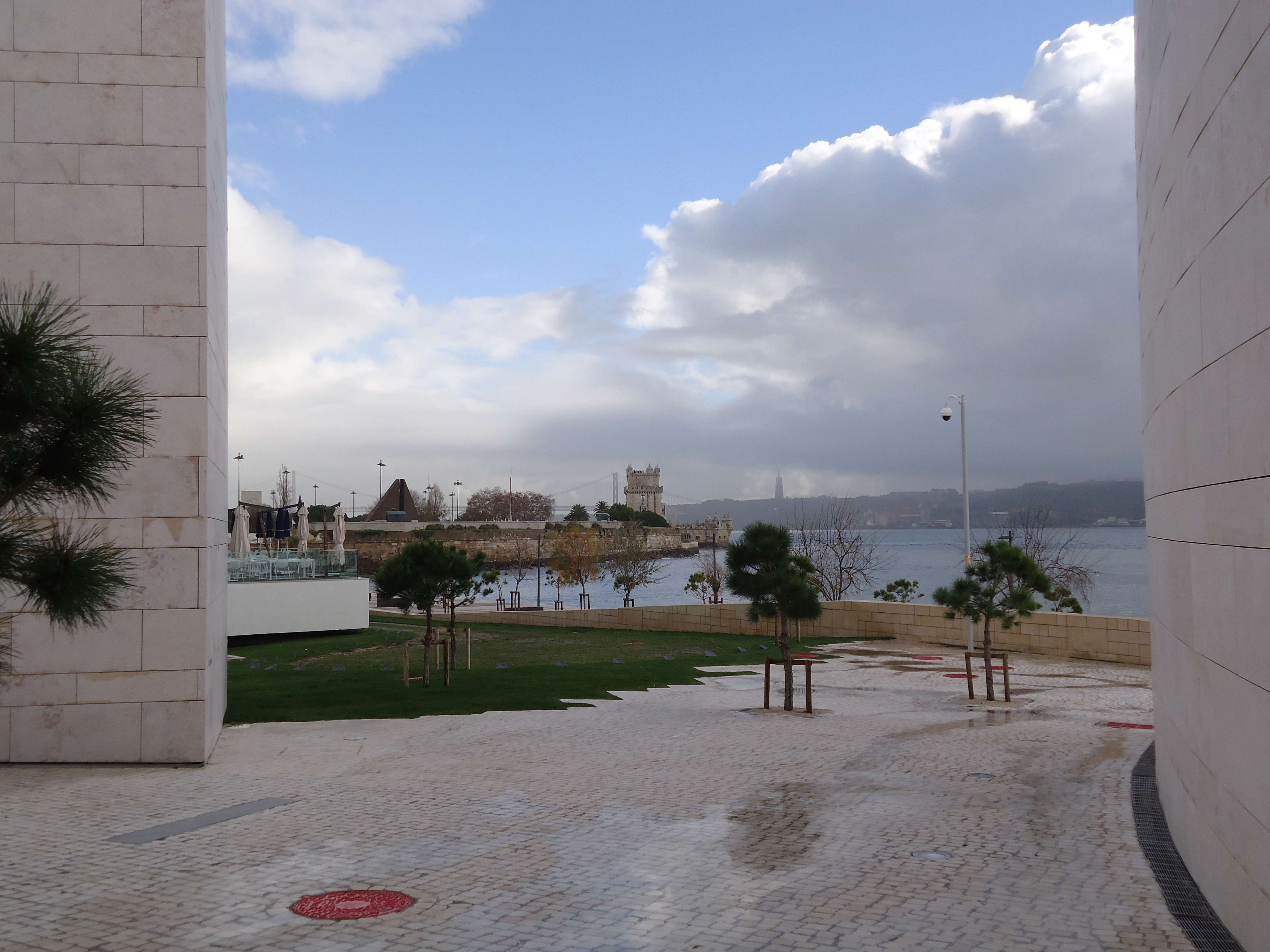 Champalimaud Centre for the Unknown, Lisboa, Portugal: vista externa. Ao fundo, a Torre de Belém, a Ponte 25 de Abril e o Cristo-Rei de Almada.